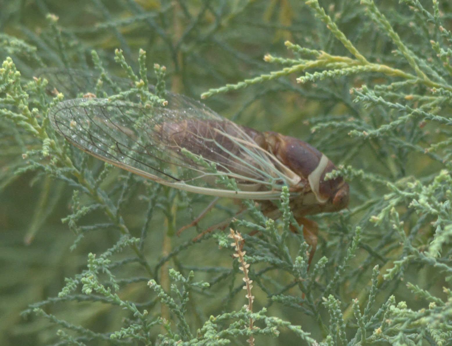 Diceroprocta apache, Citrus Cicada, ID Confidence: 90